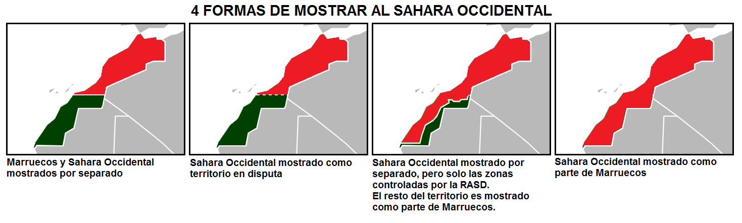 Cómo se representa en mapas al Sahara Occidental